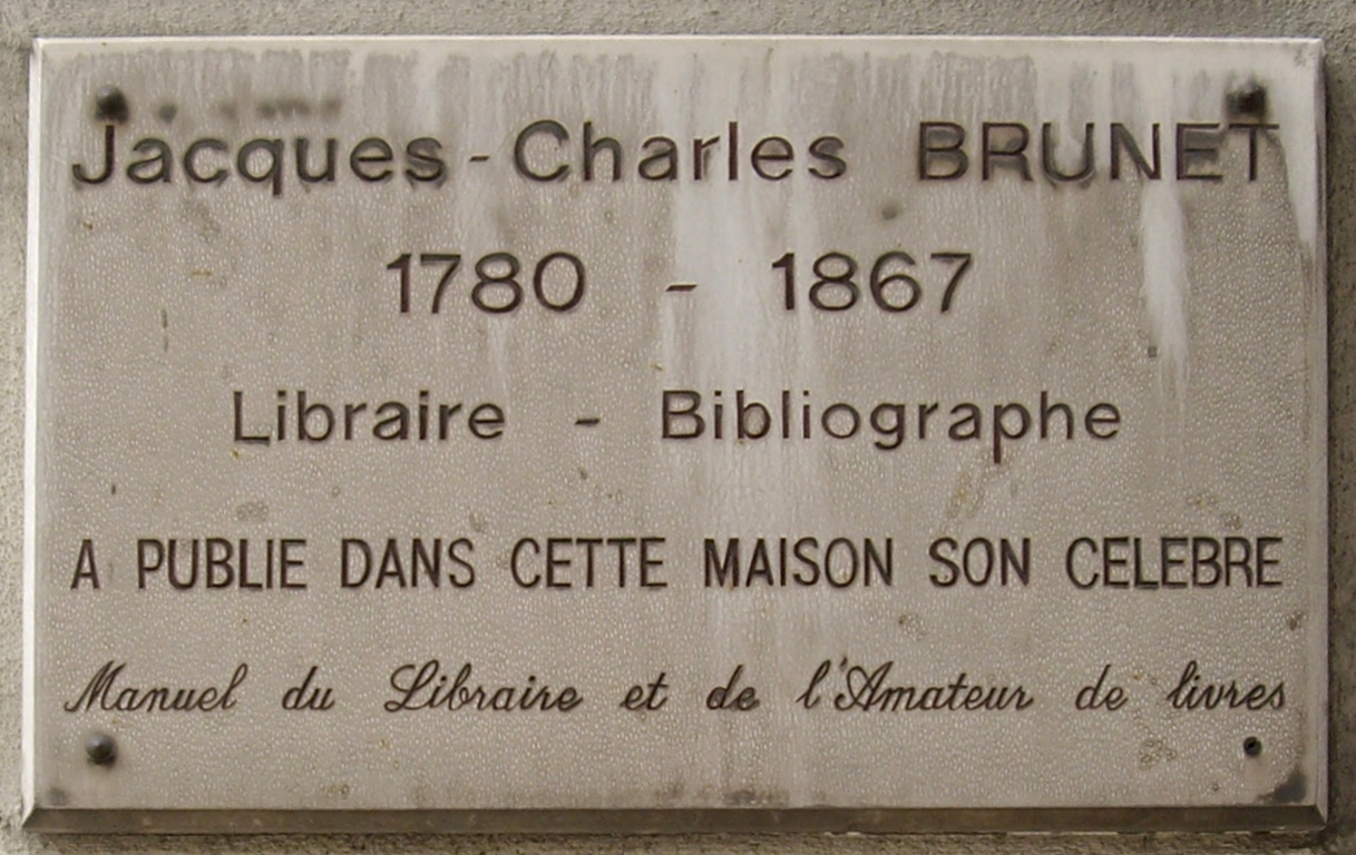 Plaque apposée au n° 4 de la rue Gît-le-Cœur, Paris 6e, où habita le libraire-bibliographe Jacques-Charles Brunet (1780-1867) et où il publia son Manuel du libraire et de l'amateur de livres.